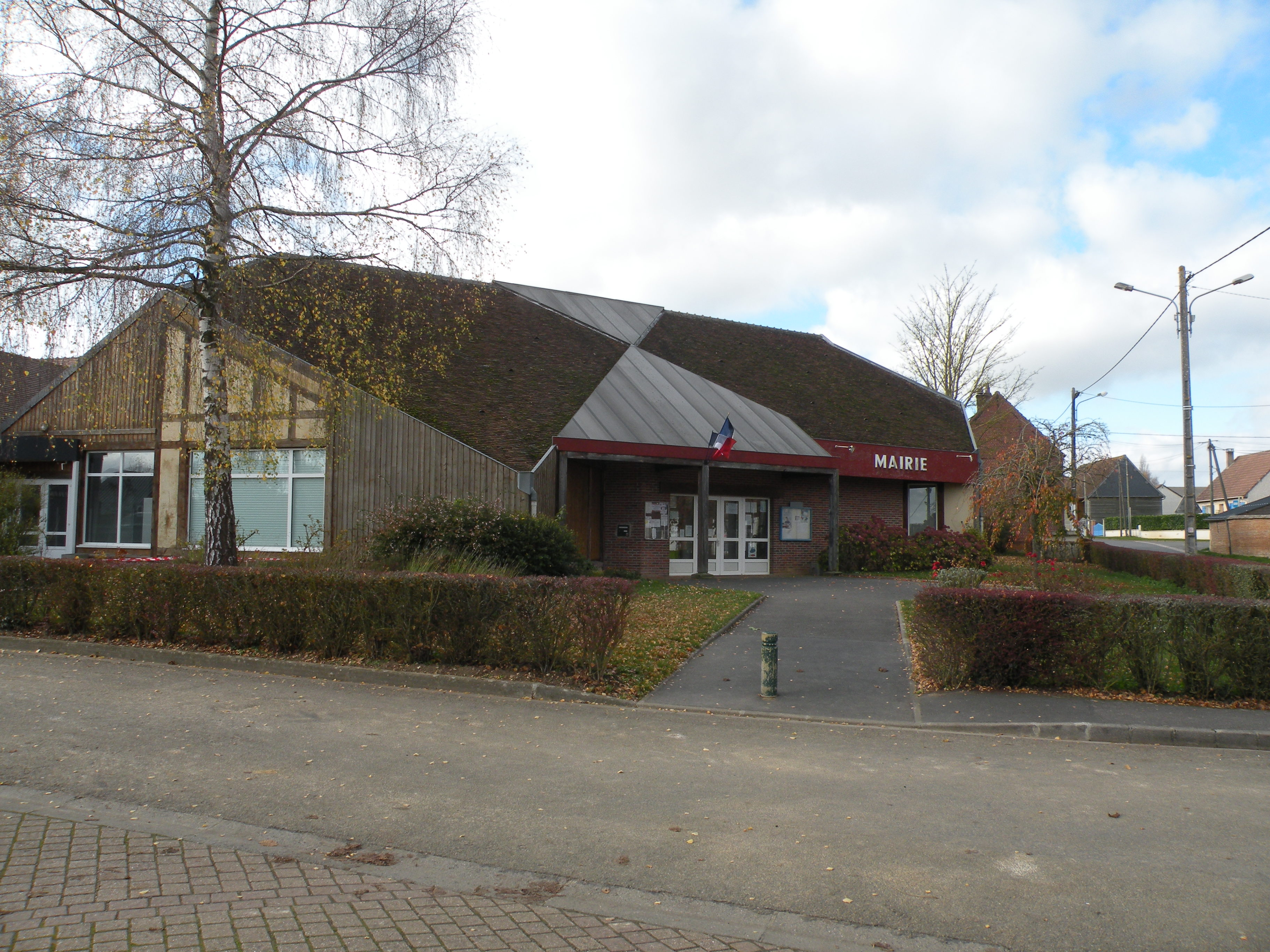 Velennes (Oise)